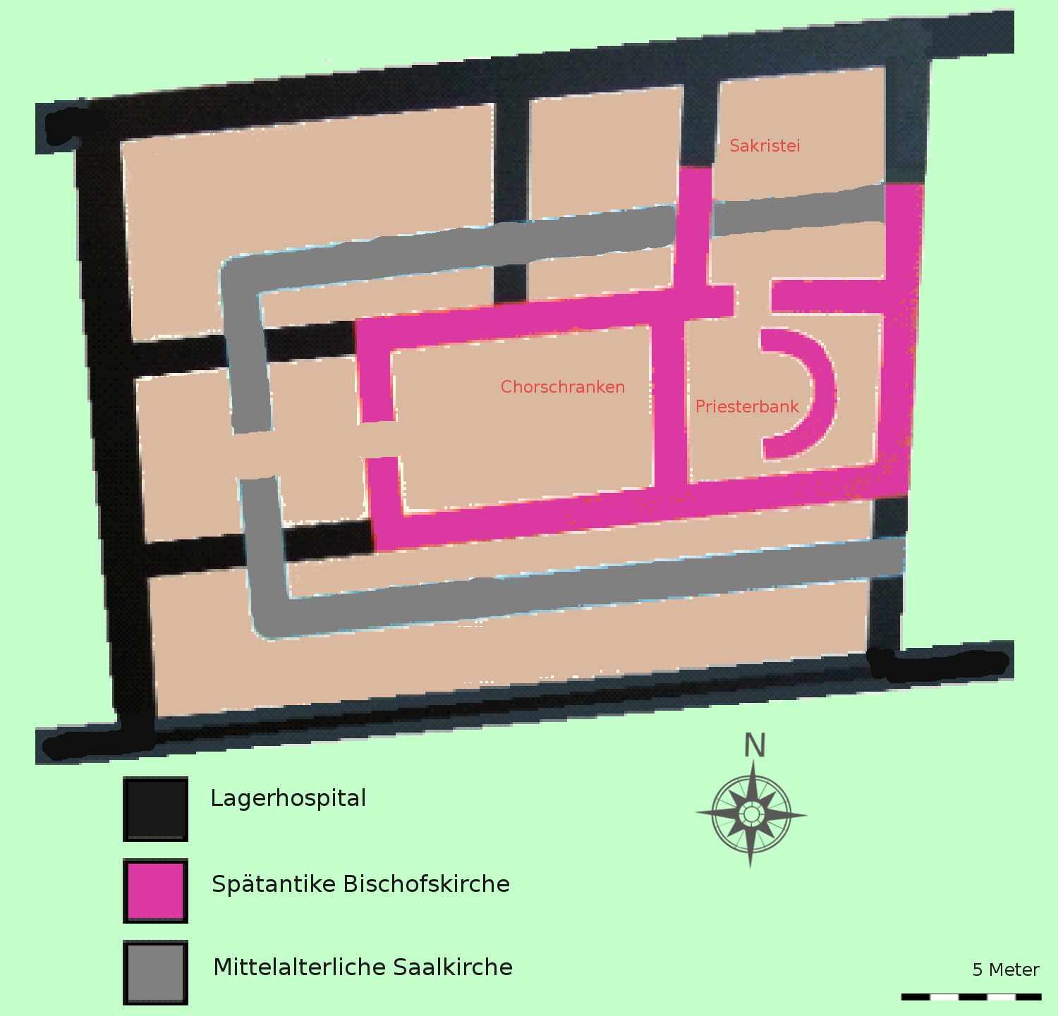 Skizze Bauphasen der frühchristlichen Maria-Anger Kirche im Lagerhospital des LL Lauriacum (Enns/Lorch in Österreich) nach Erich Swoboda, 1936.